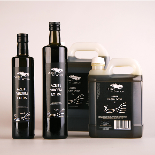 Portugalshop-olivovy-olej-extra-panensky